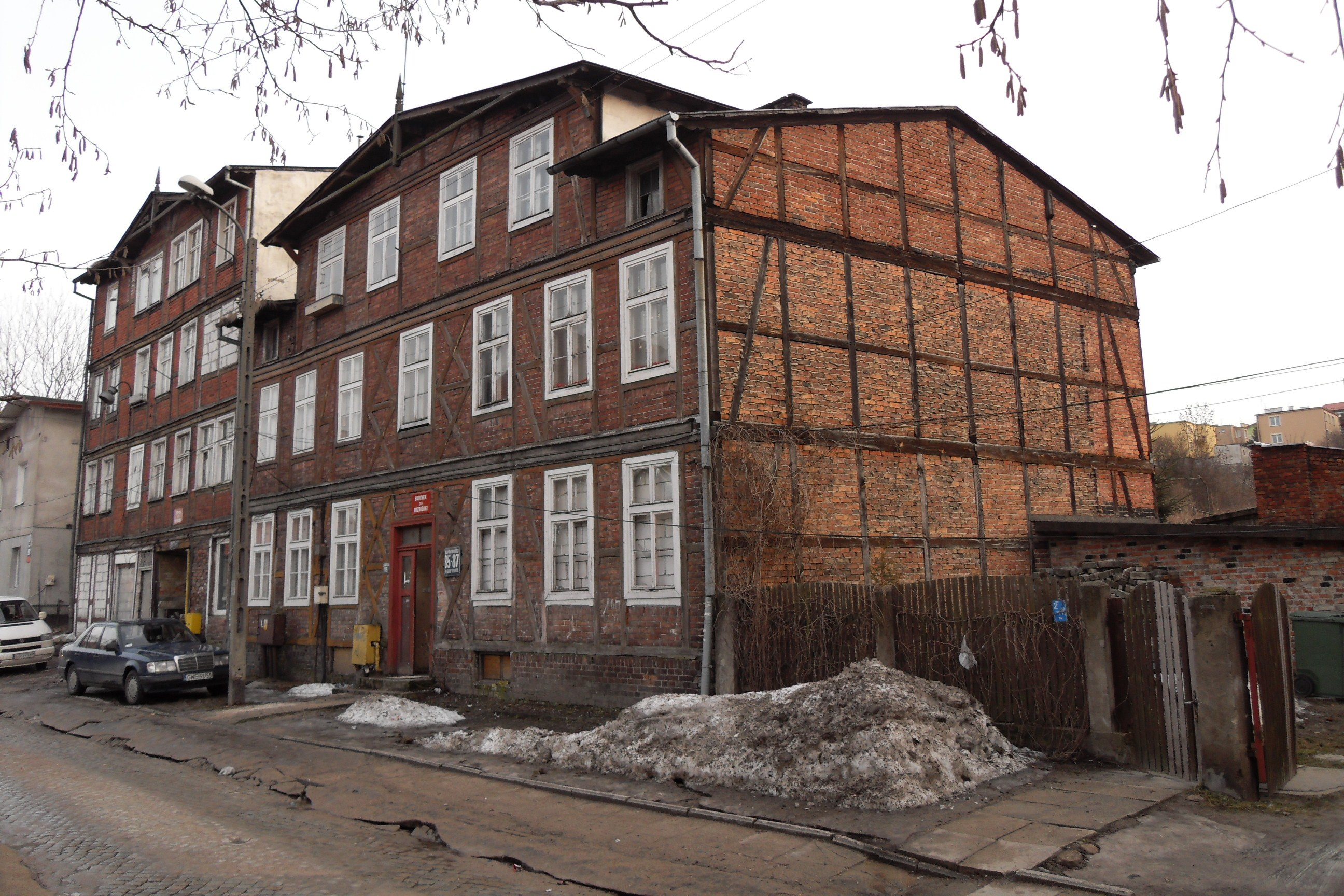 Ulica Malczewskiego 85-87 w Gdańsku.